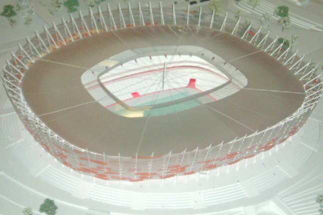 Maquette du futur Stade National de Varsovie